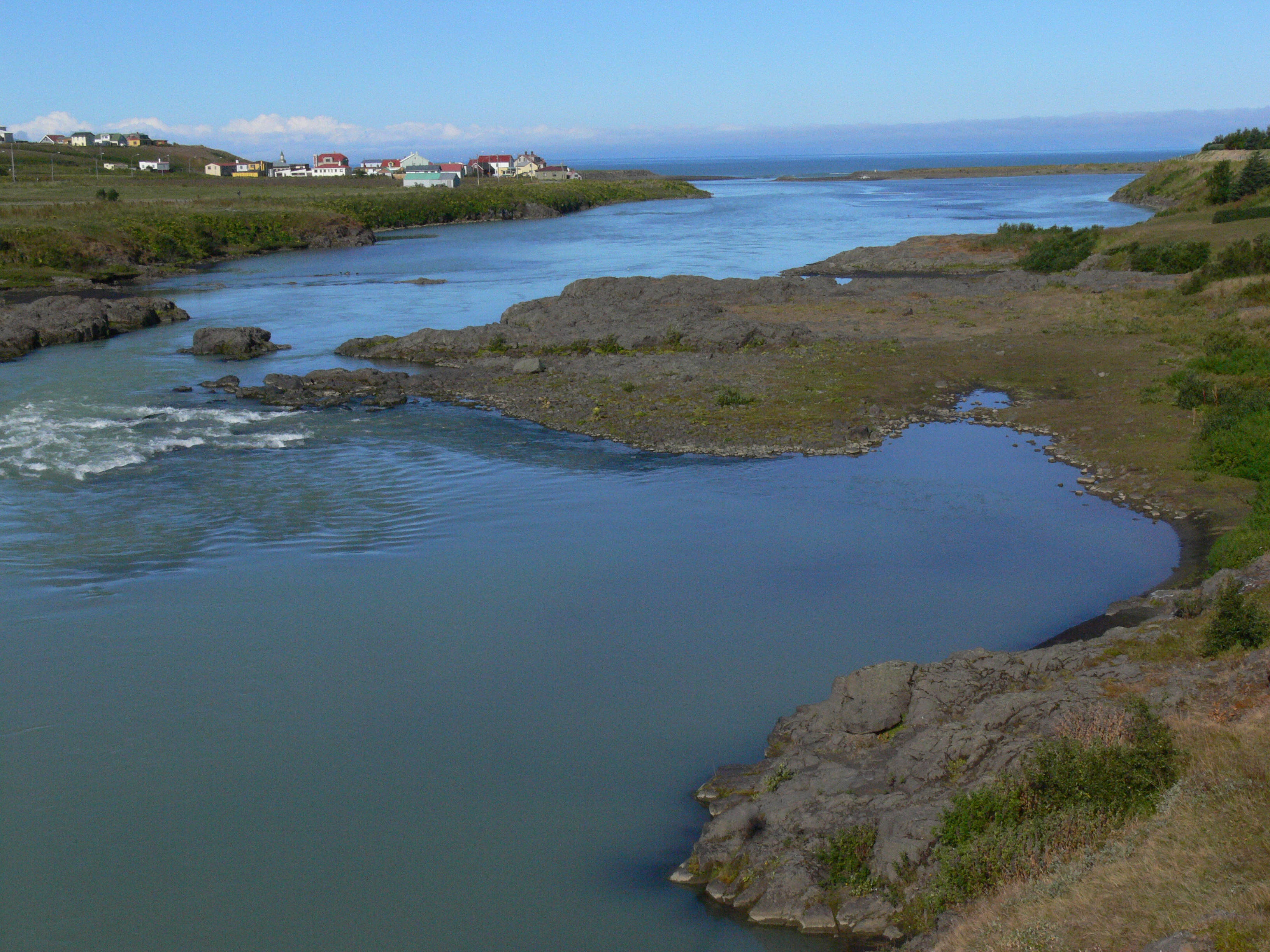 Der Ort Blönduós in Nordisland am Fluss Blanda.